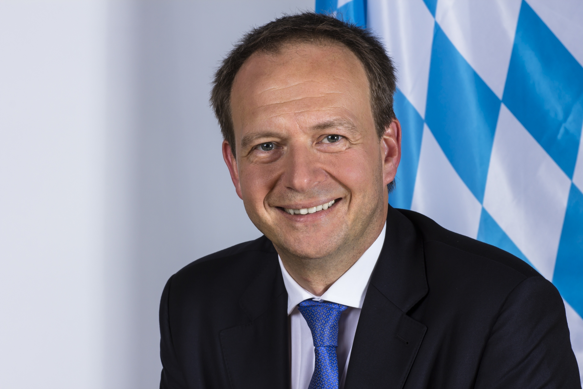 Bernd Weiß, MdL, Juli 2012, Landtagsprojekt Bayern 2012